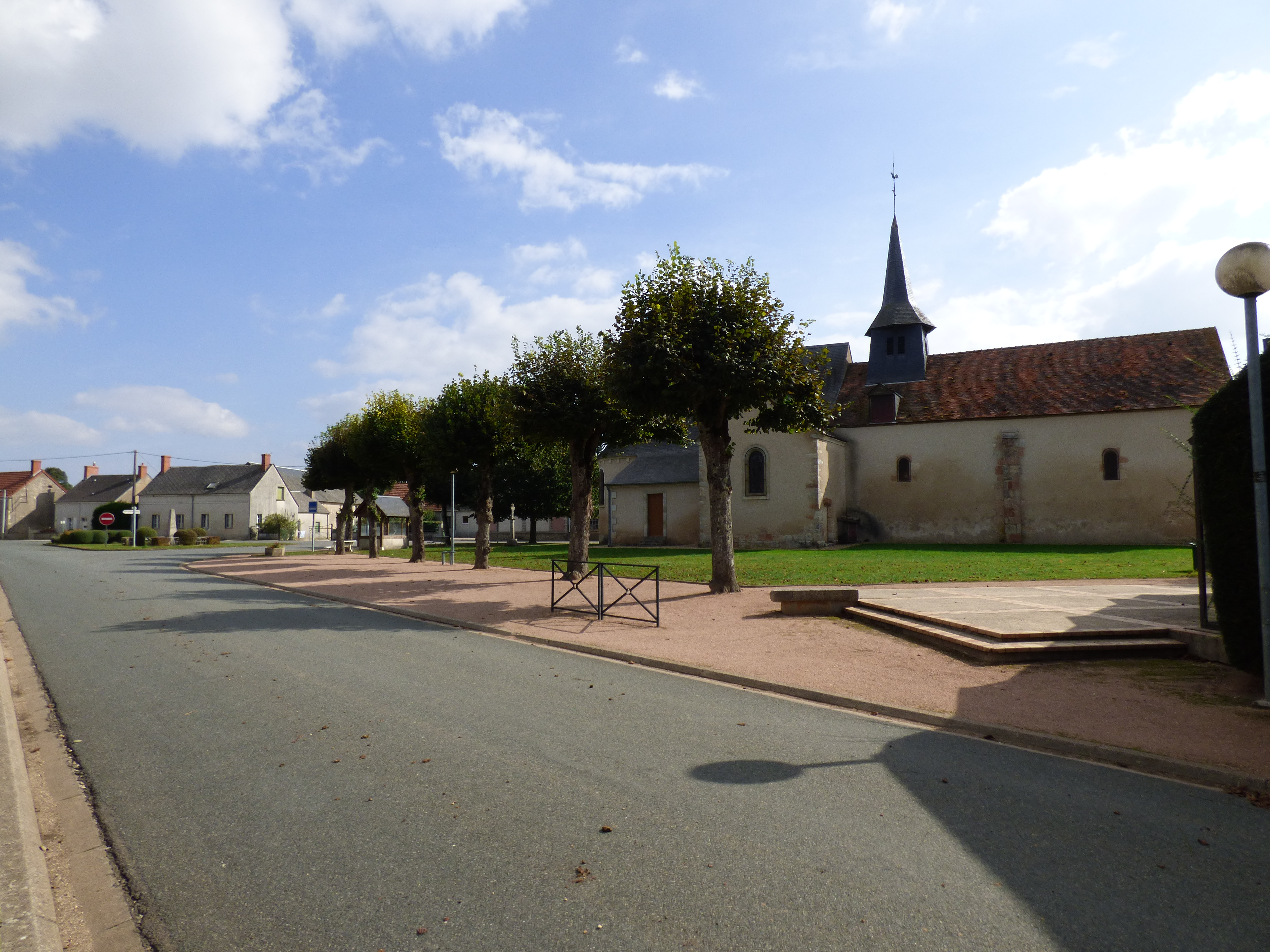 Place de l'église